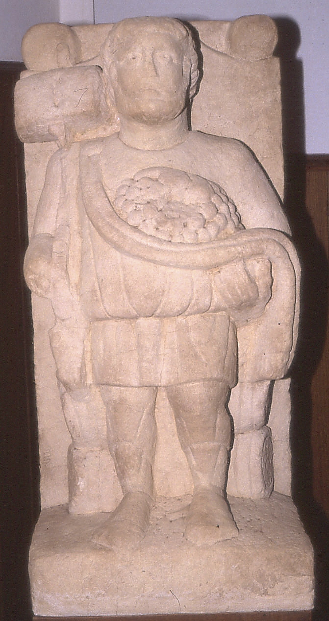 Abguss der Skulptur des römischen Weingottes Sucellus aus der römischen Villa in Kinheim-Kindel. Das Original entdeckt bei Wegebauarbeiten 1976.